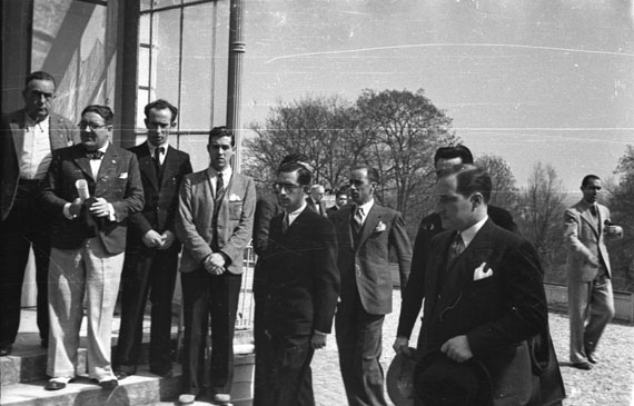 Agirre Lehendakaria - The Lehendakari Agirre